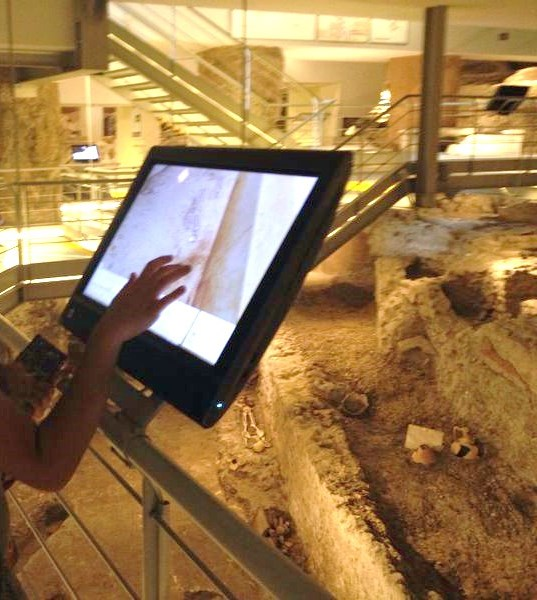 panel interactivo via Triumphalis